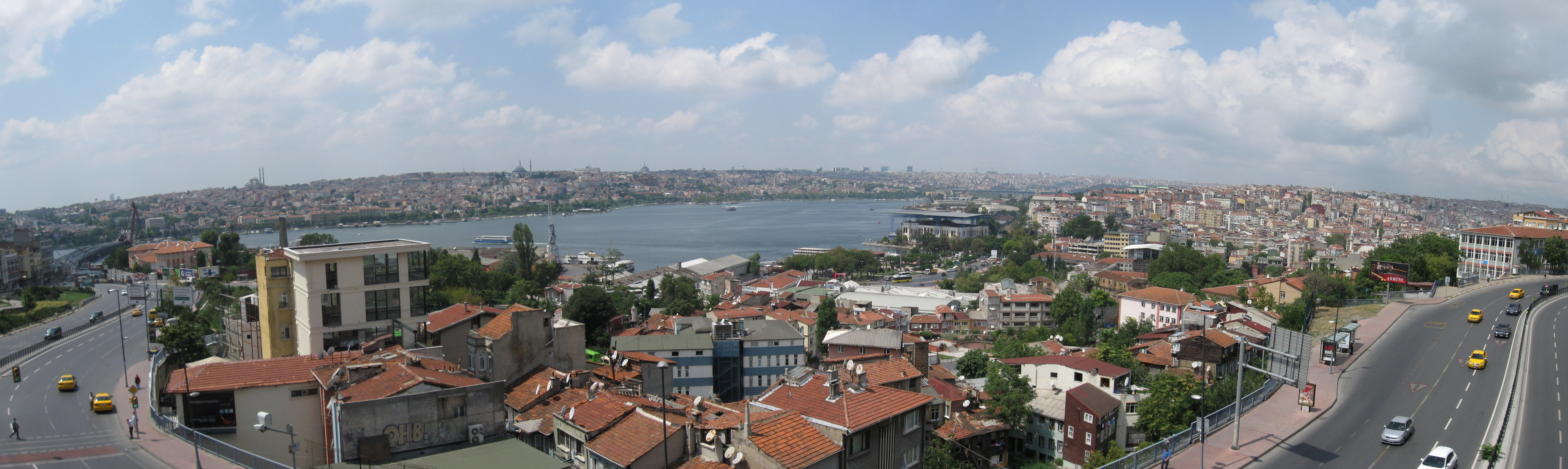 Ոսկեղջյուր